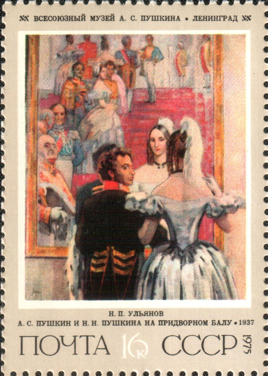 "А. С. Пушкин с женой на придворном балу" (Pushkin with wife at a ball), 1937, by Nikolai Ulyanov